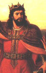 König Imre (Emmerich) von Ungarn 1174-1204